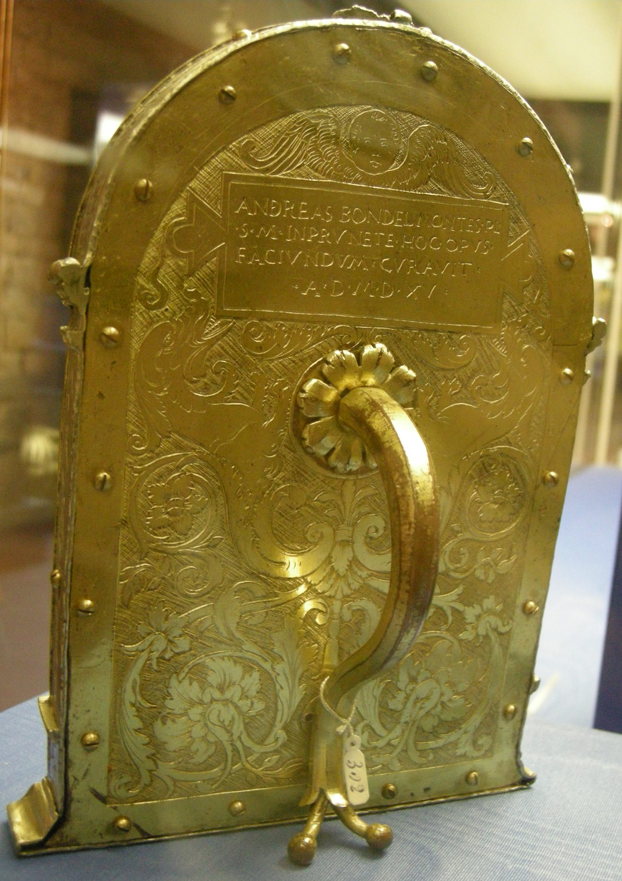 Antonio di salvi, pace con crocefissione, 1515 2